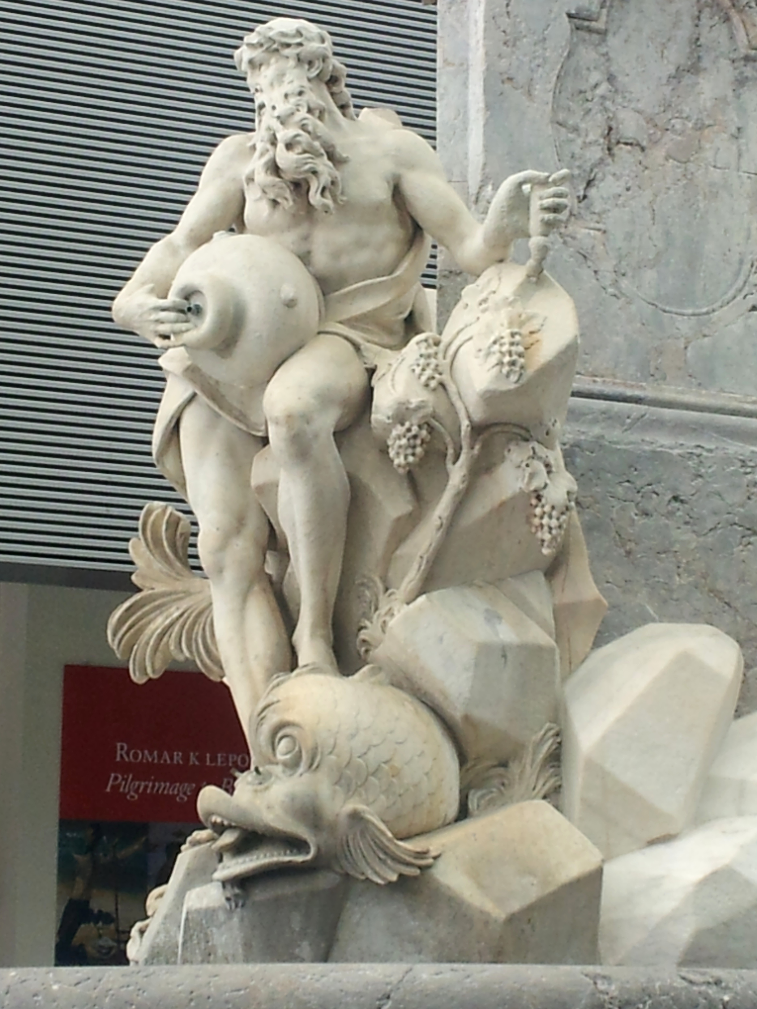 Del originalnega Robbovega vodnjaka v Narodnem muzeju v Ljubljani.